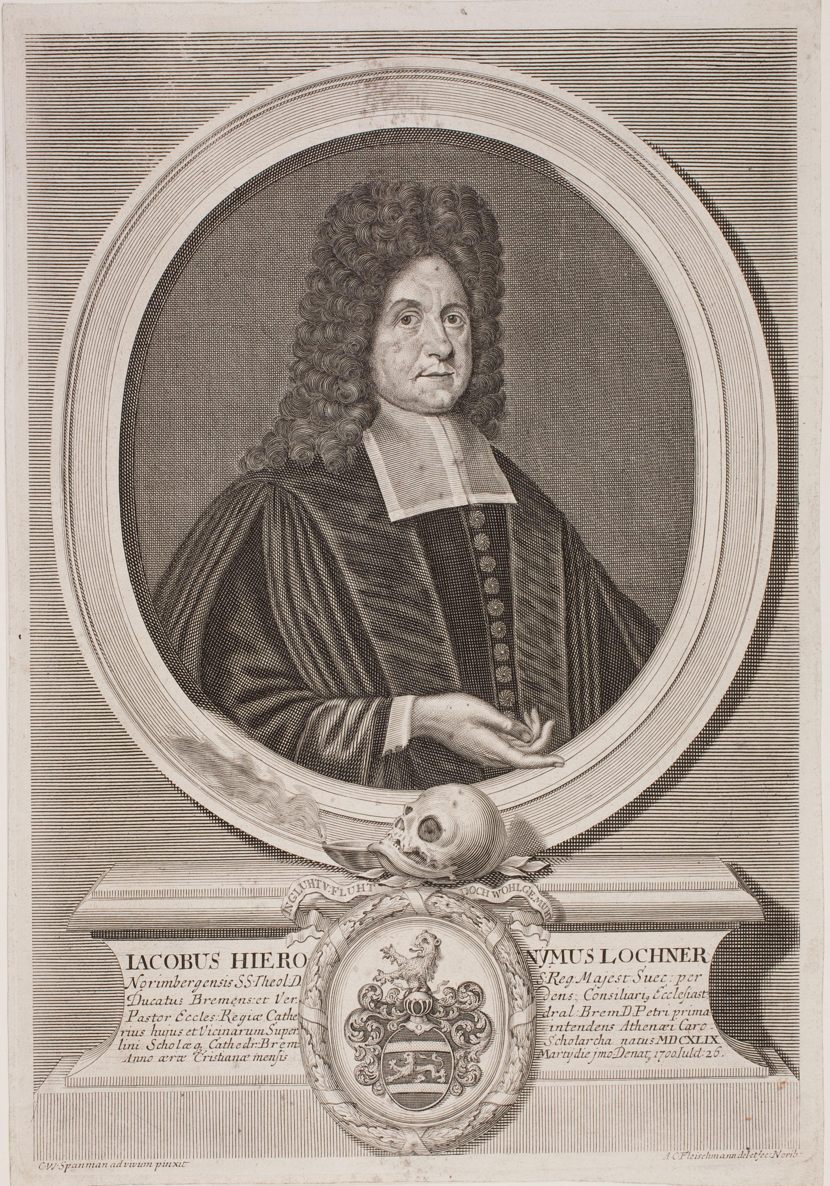 Kupferstich Jacob Hieronymus Lochner. 322 x 223 mm (Blatt); 317 x 218 mm (Platte) Wolfenbüttel, Herzog August Bibliothek, Inventar-Nr. A 12661 Literatur: Mortzfeld A 12661, Porträtsammlung Diepenbroick 8, 2347